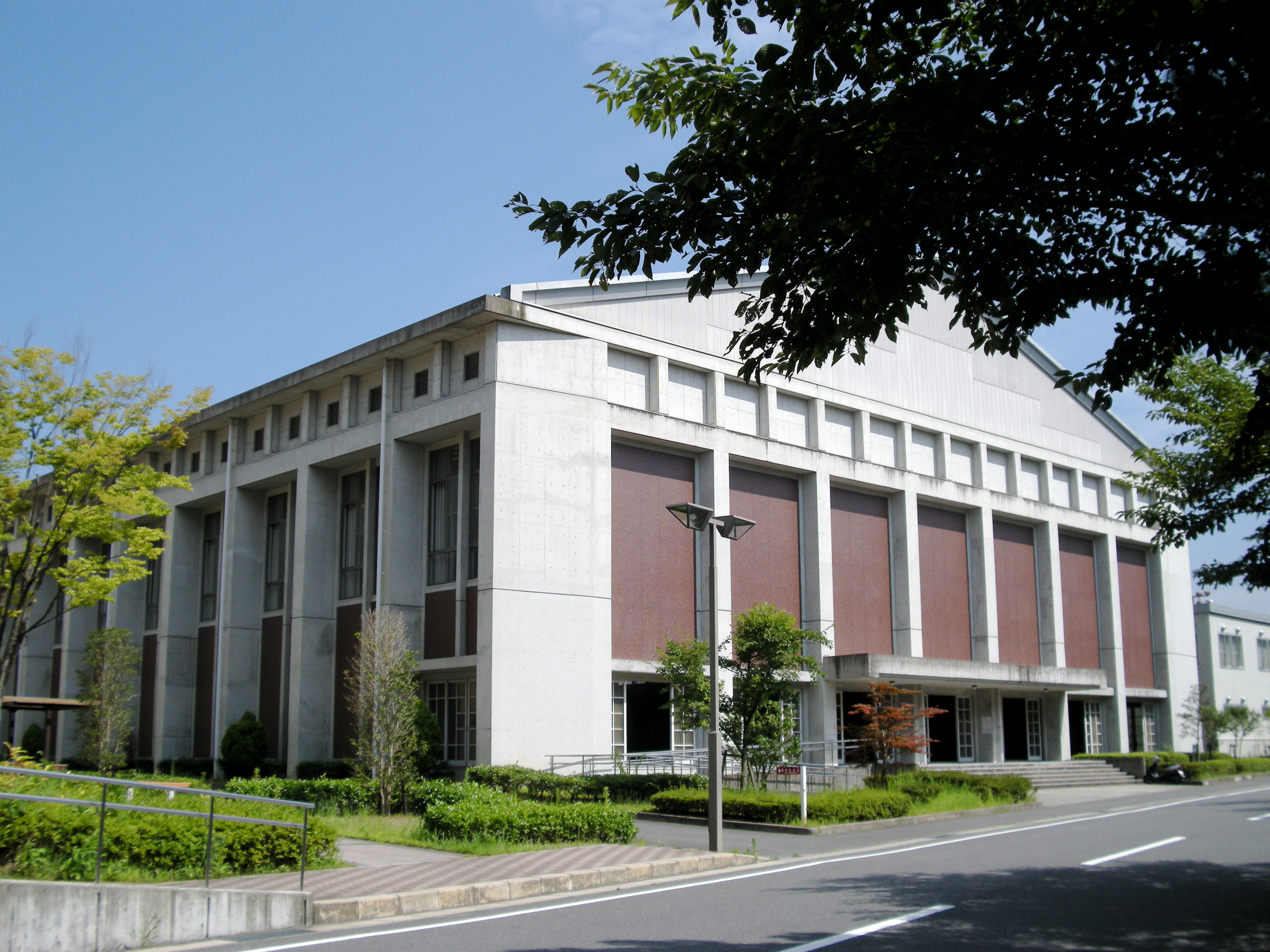 BKC Gymnasium (Biwako Kusatsu Campus, Ritsumeikan University, Japan)